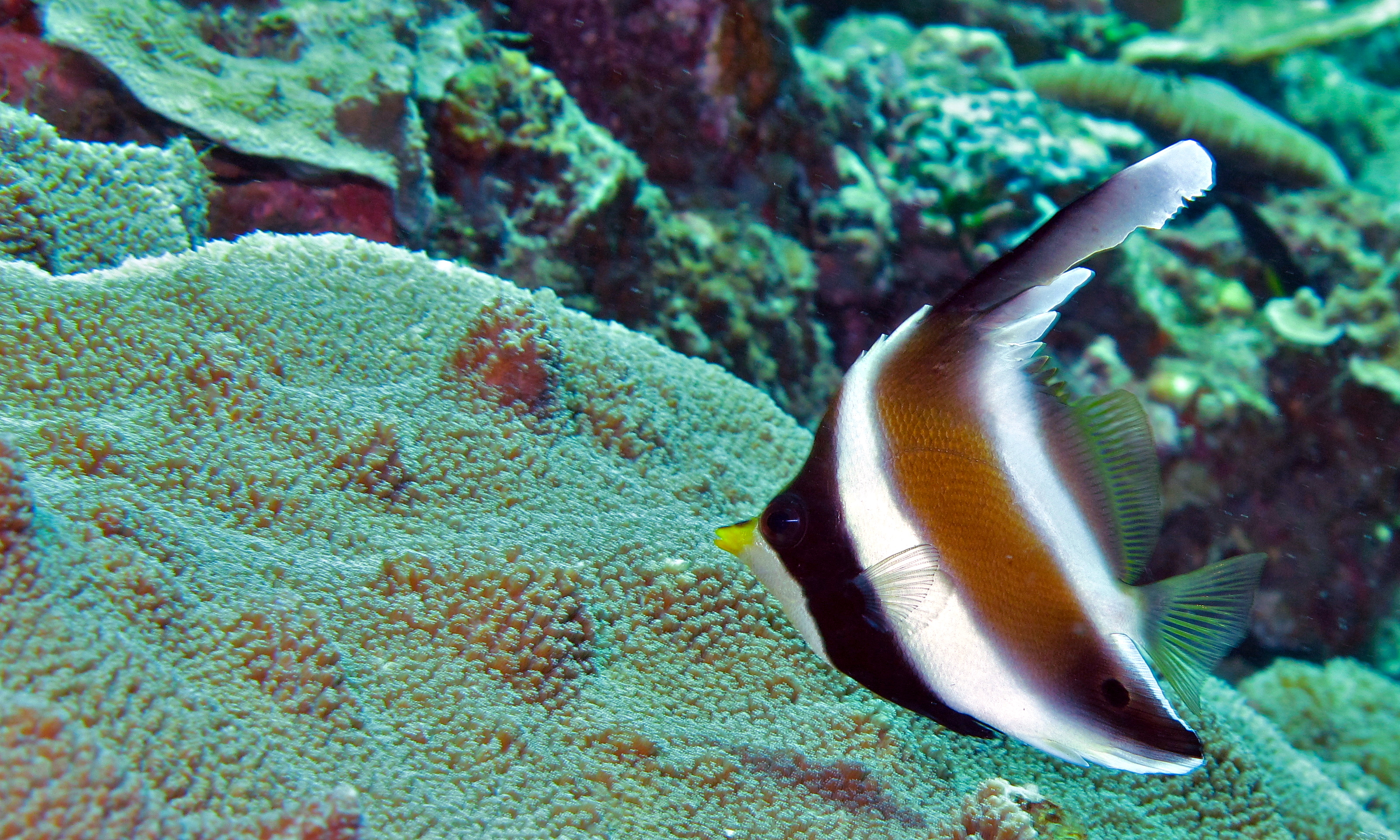 Nudi Retreat I, Lembeh Strait, Sulawesi, INDONESIA